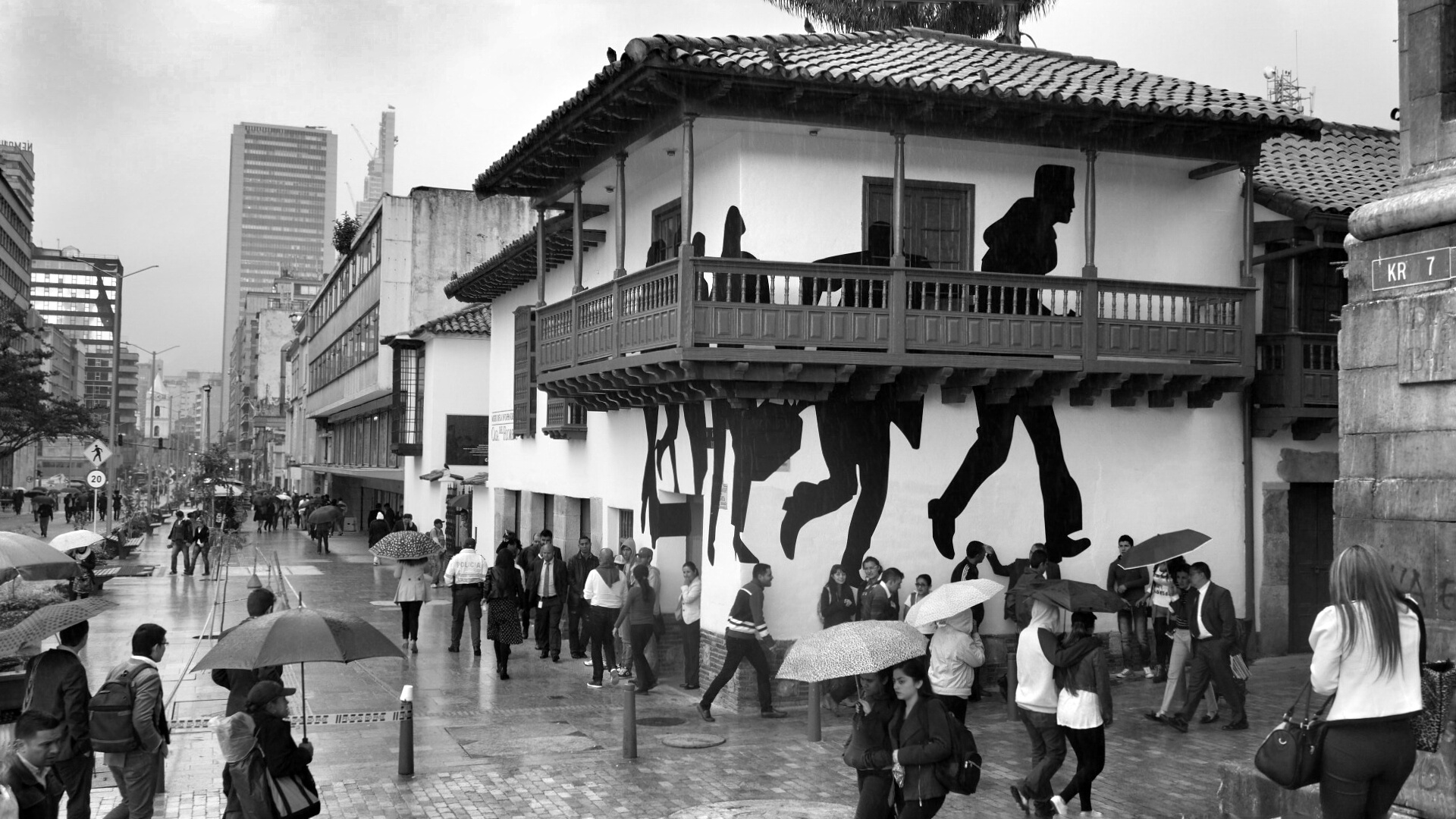 Casa del Florero- Colombia